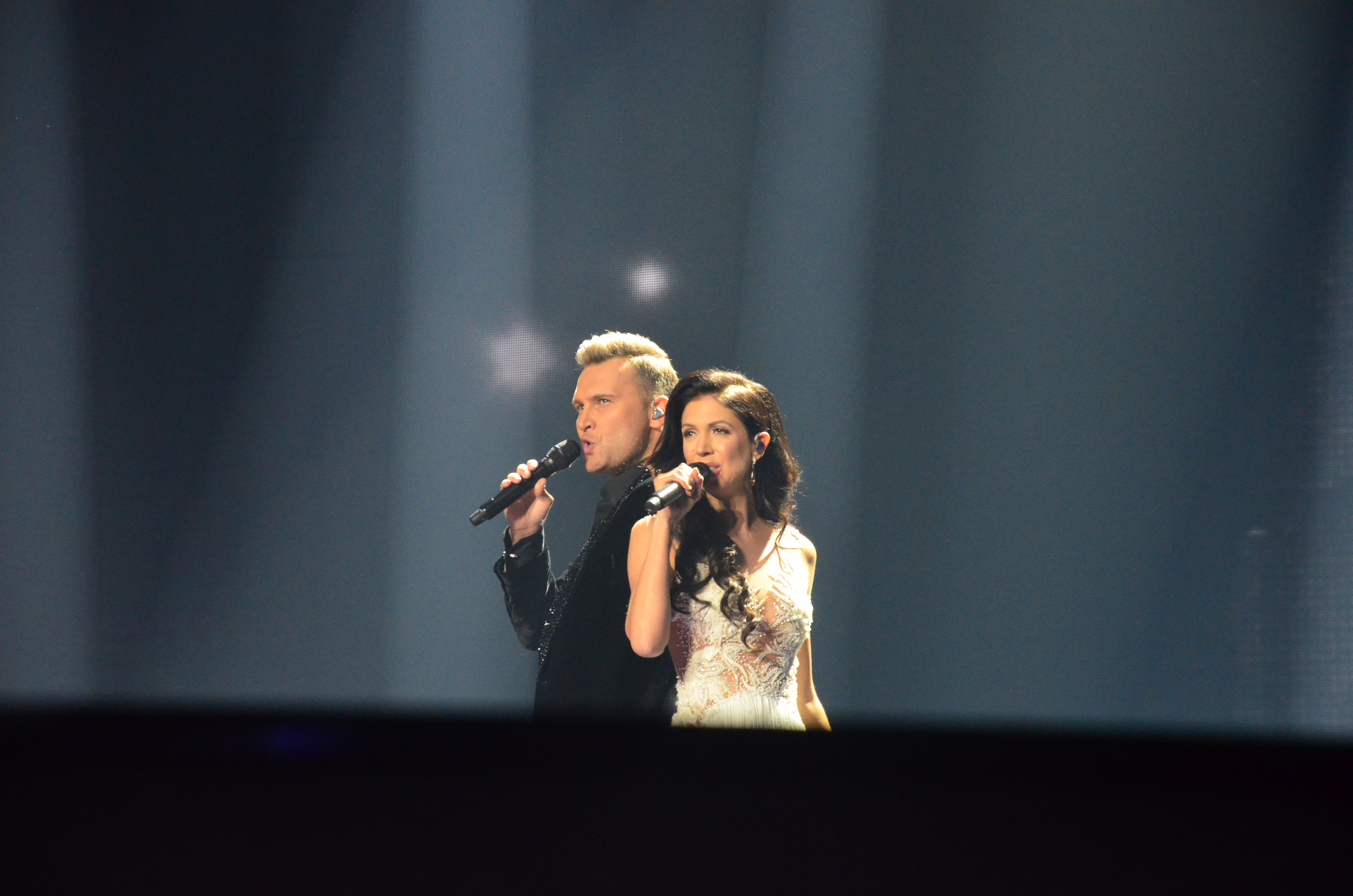 10 травня 2017 року у Києві відбулась генеральна репетиція 2 півфіналу "Євробачення".